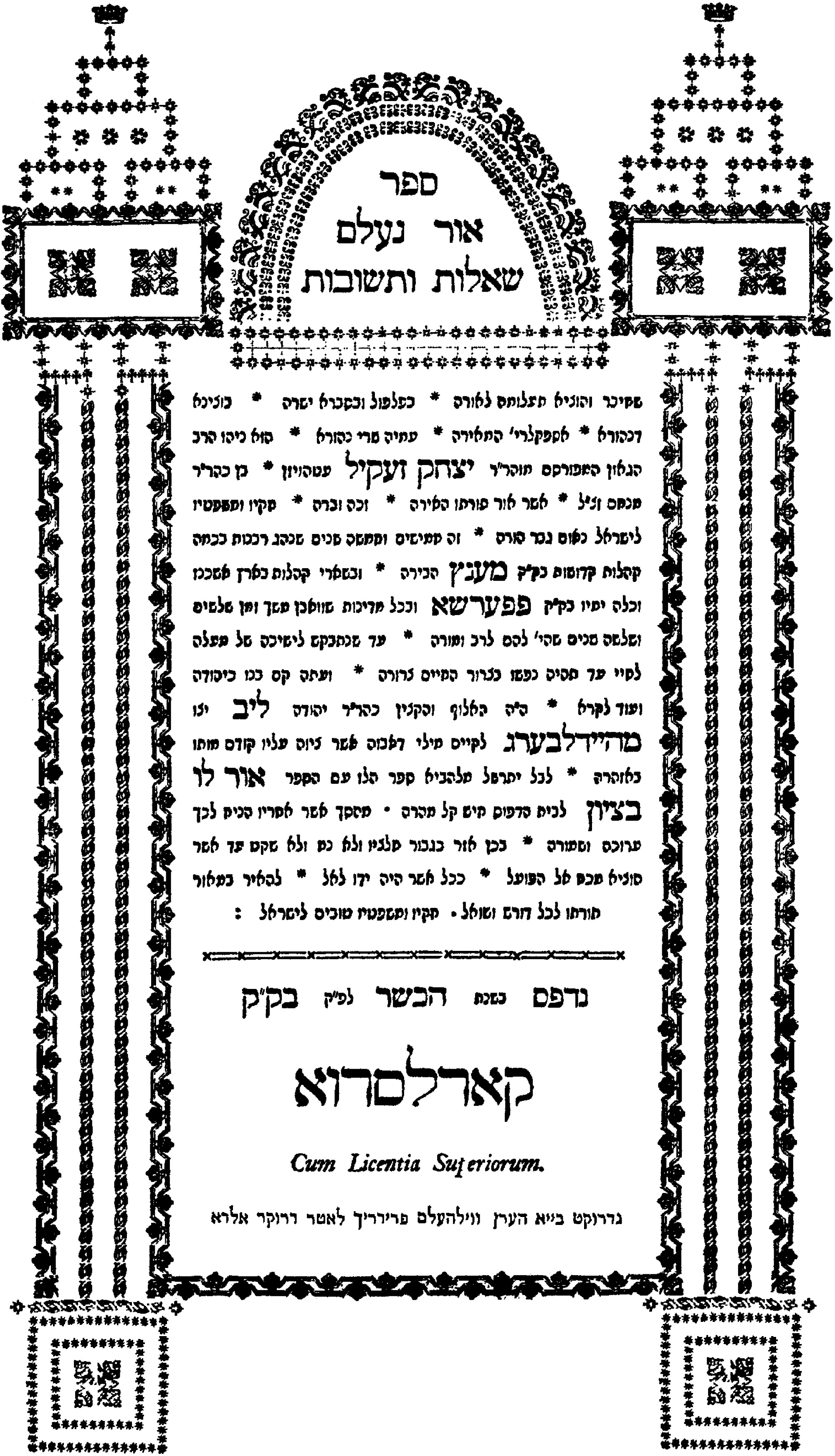 שער לשו"ת אור נעלם